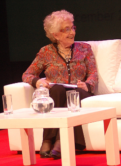 Vinton Cerf y Ida Holz, durante el acto en el que la Intendencia de Montevideo declaró Visitante Ilustre de Montevideo al ingeniero estadounidense Vinton Cerf. Diciembre de 2015